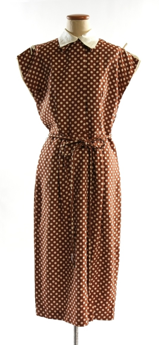 Klänning av brun dupion med vita prickar. Slätt liv med knäppning fram. Holkärm, uppslitsad på axeln, krage och ärmisättning av vitt linne, kjol med fyra små lagda veck fram och ett kort djupt mitt bak. Två grunda fickor i sidorna. Konfektionsydd. Med roulean-skärp av samma tyg.